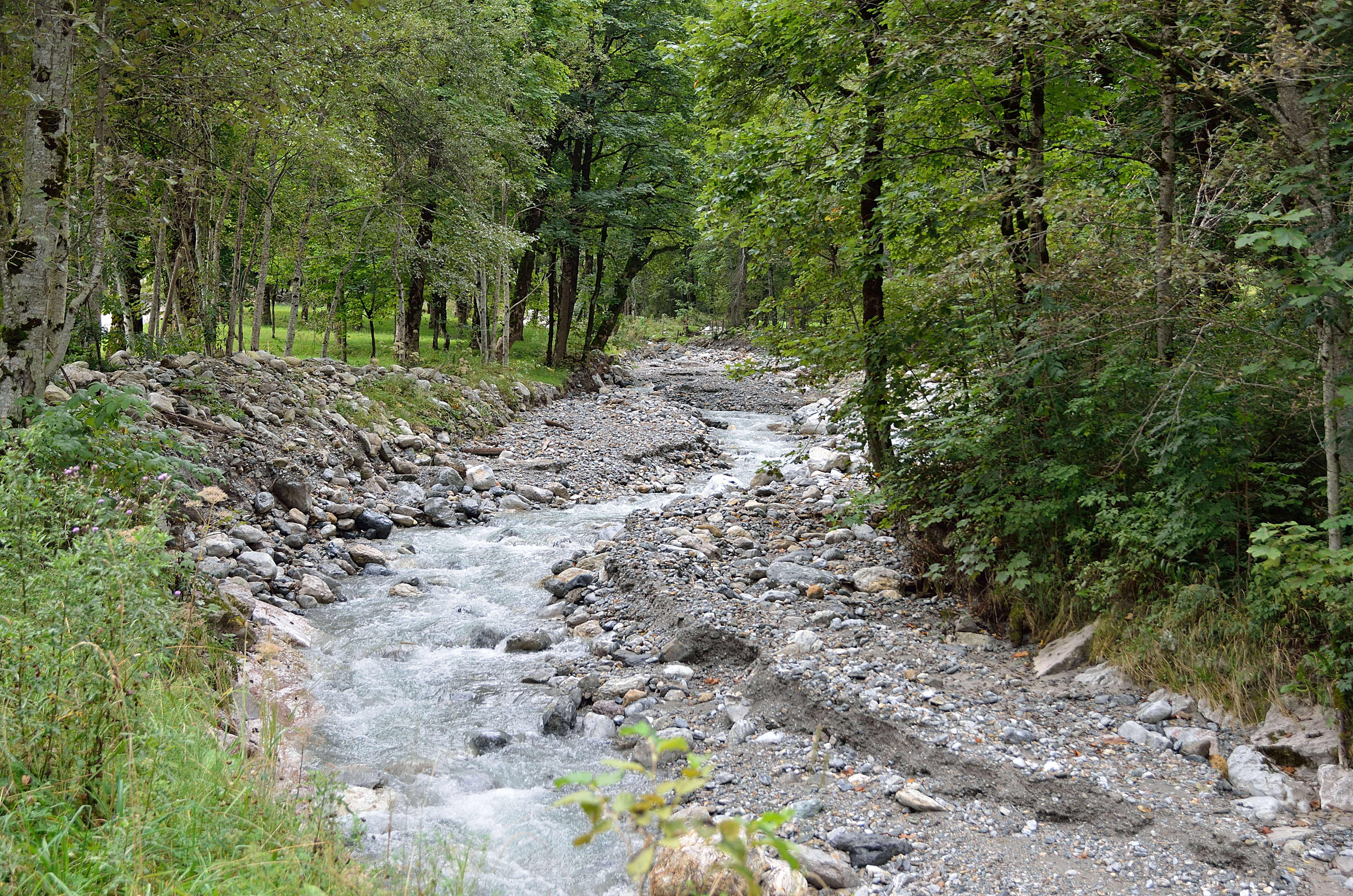 Am Beginn des Ennsradwegs in Flachau in Salzburg, dort wo die (kleinere) Enns von links (im Bild) in die Pleißling mündet und ab da Enns heißt.